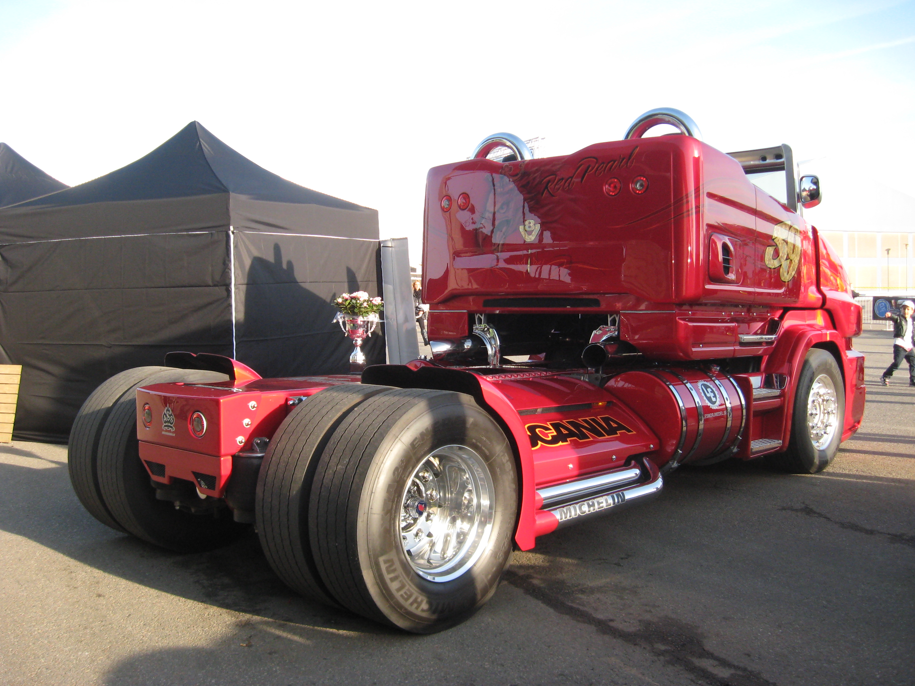 Scania Roadster